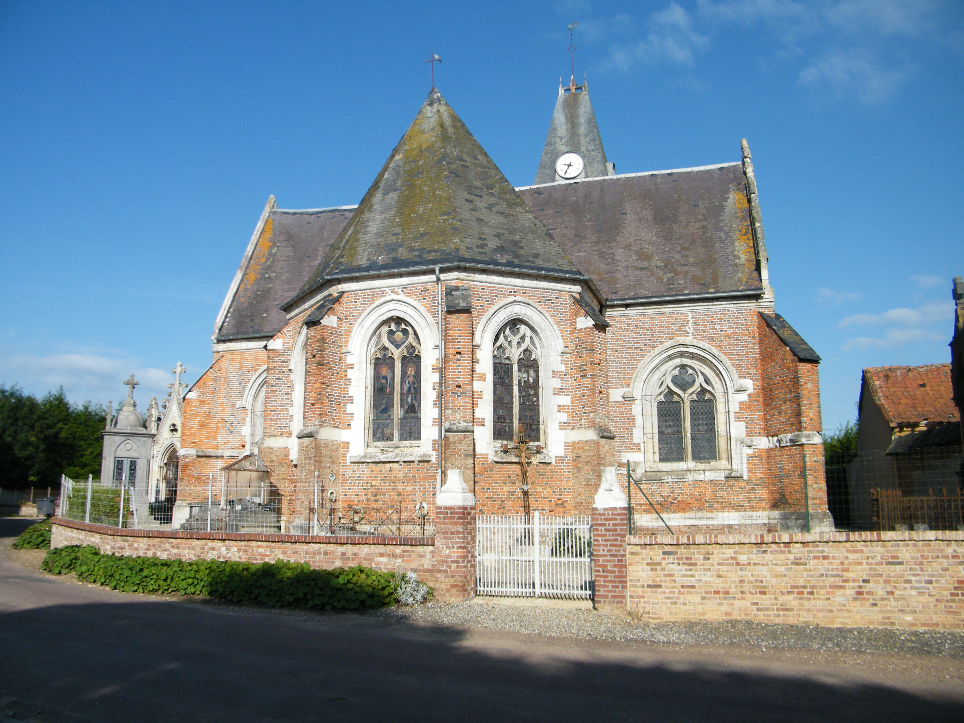 église.